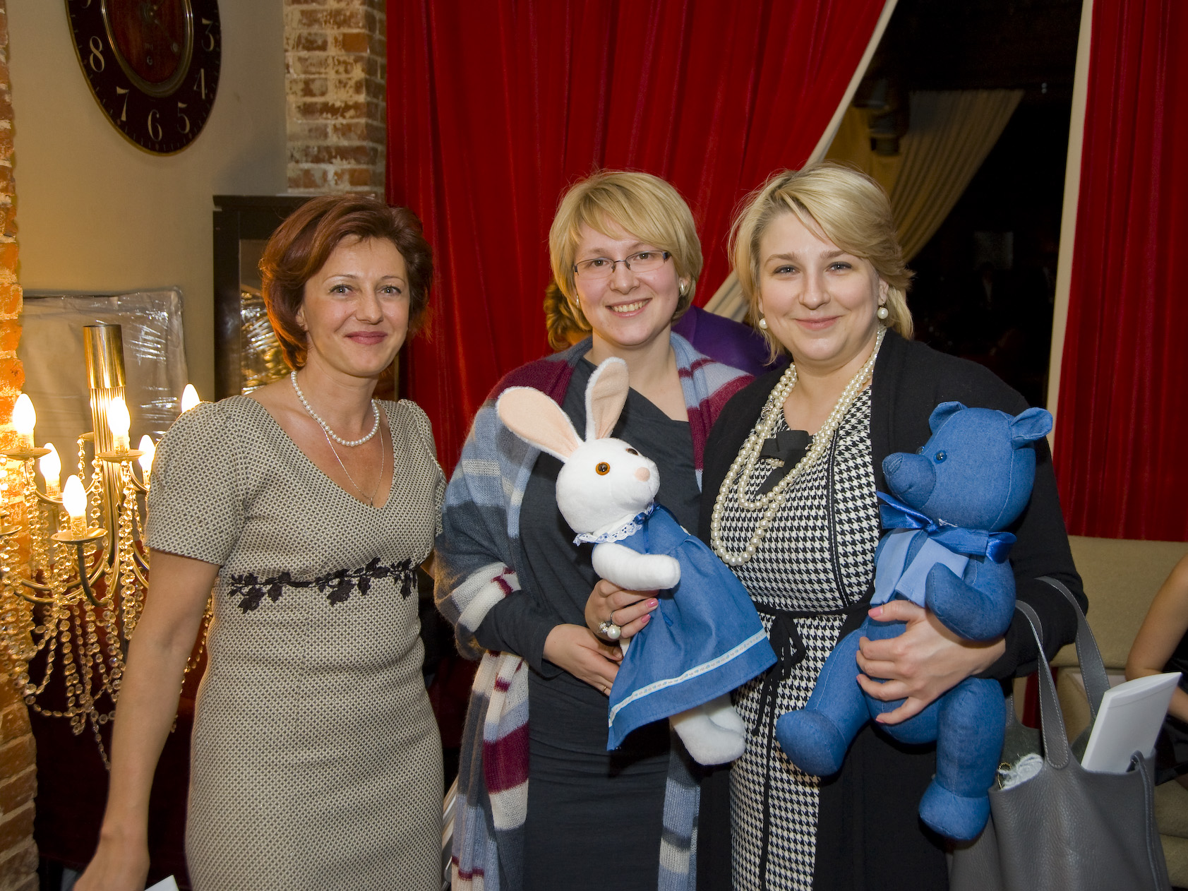 Елена Смирнова, Татьяна Пушная, Татьяна Якубович. Ежегодный благотворительный вечер фонда «Созидание».